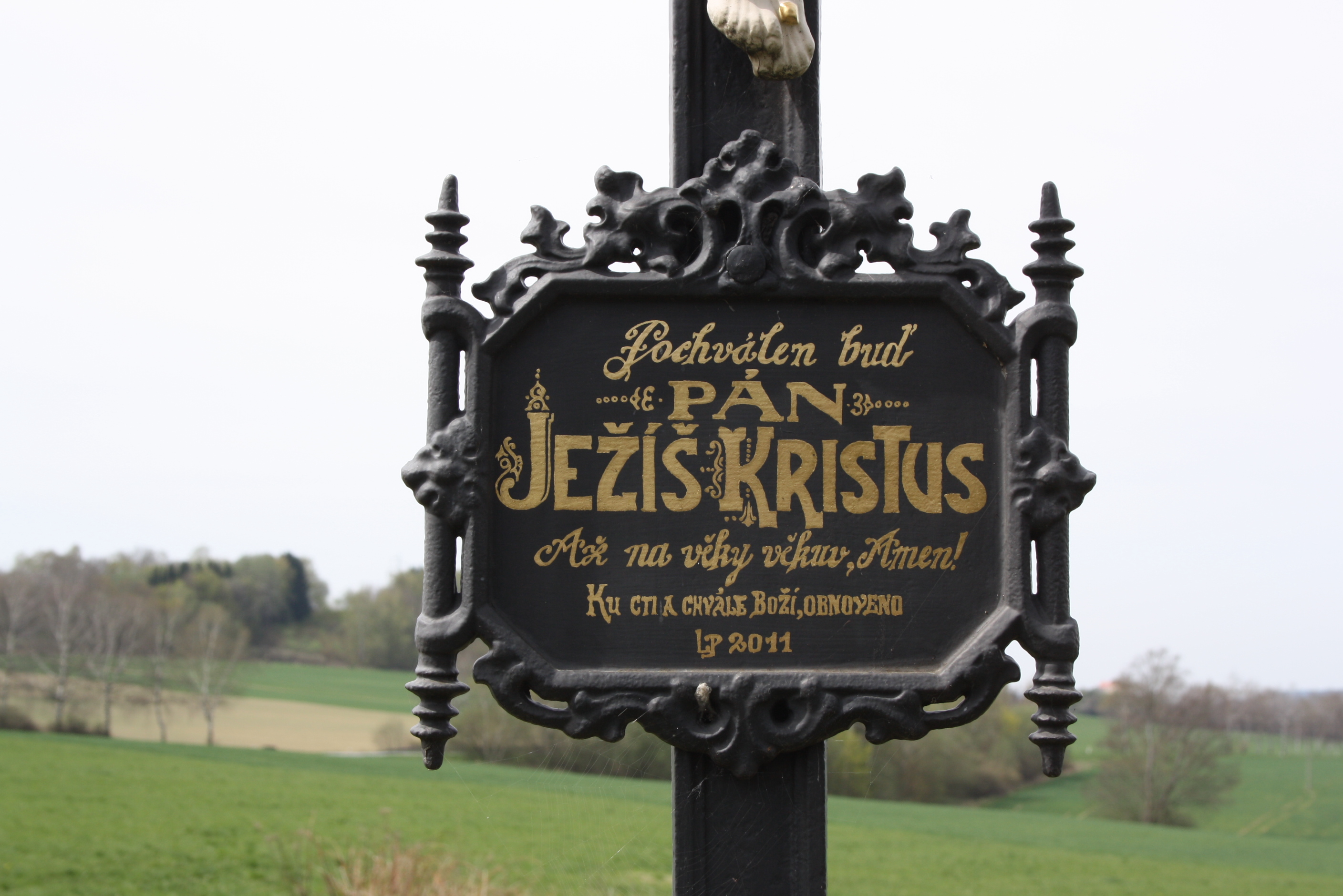 Kříž u rybníka, Zlátenka, okres Pelhřimov – detail cedule s nápisem „Pochválen buď Pán Ježíš Kristus“